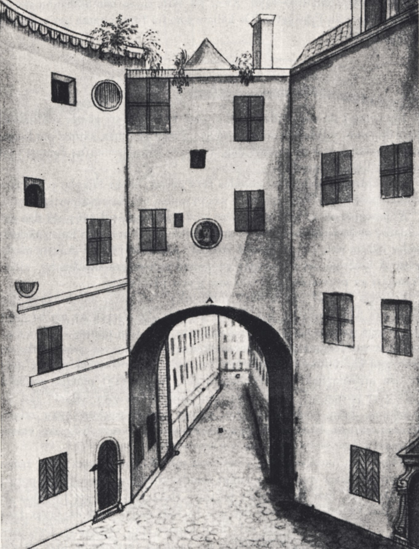 Köpmanporten i Gamla stan strax innan den revs 1685